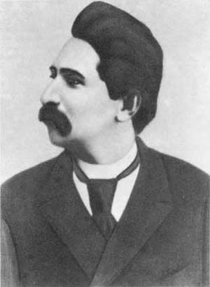 Фотопортрет Аркадия Коца (1872-1943)